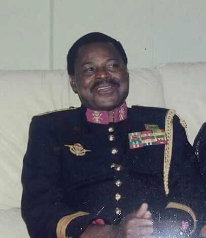 Photographie privée du Général Singa-Boyenge Mosambaye dans sa propre demeure